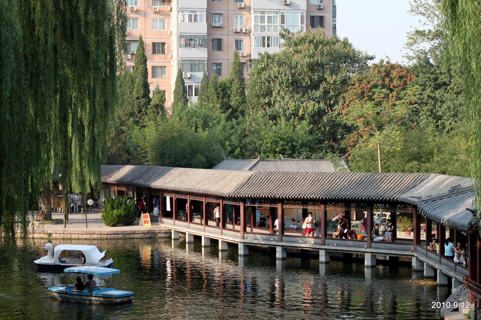 北京团结湖公园